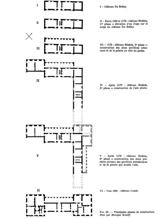 Evolution des diverses constructions du château.